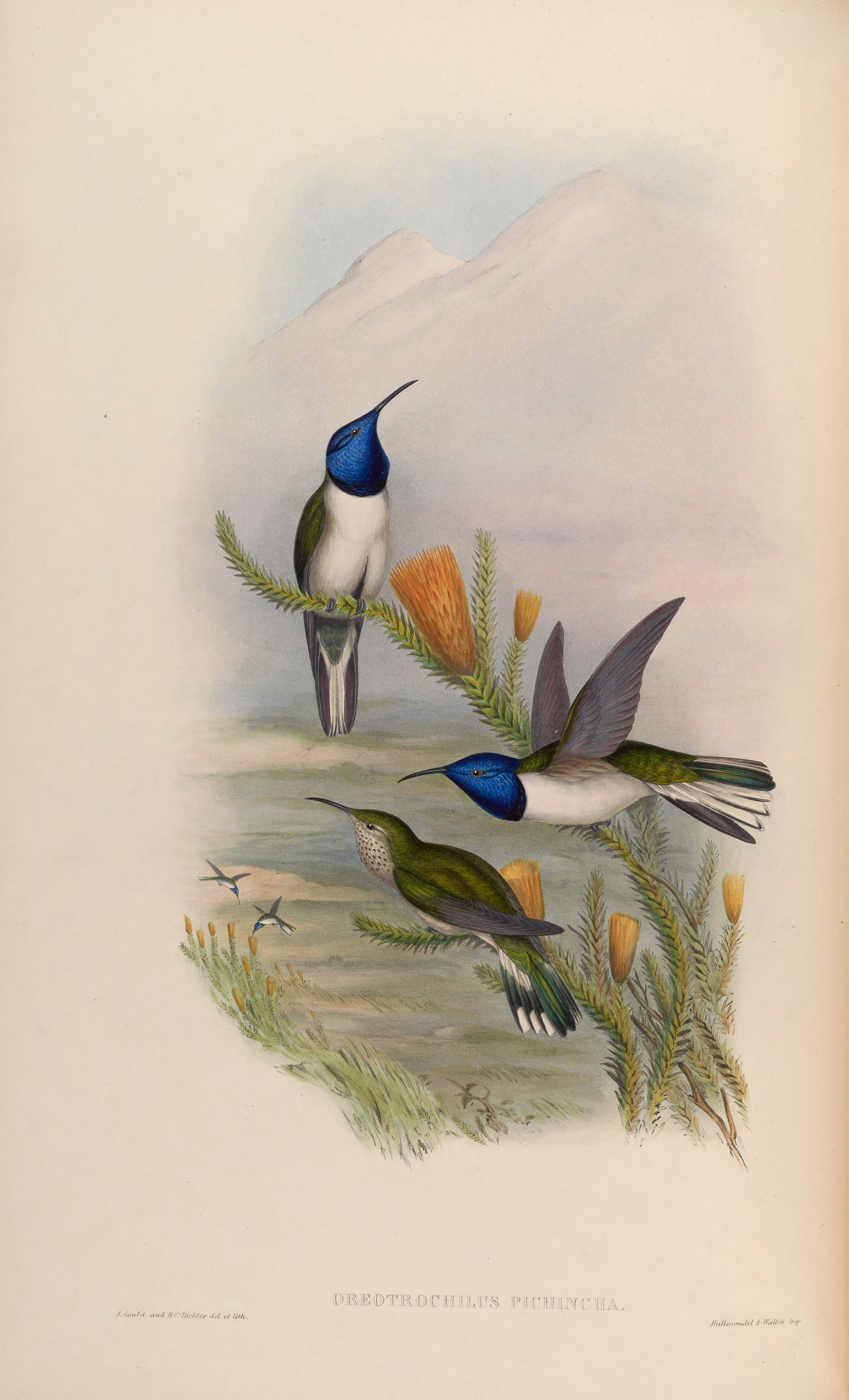 Oreotrochilus pichina = Oreotrochilus chimborazo jamesonii [1]